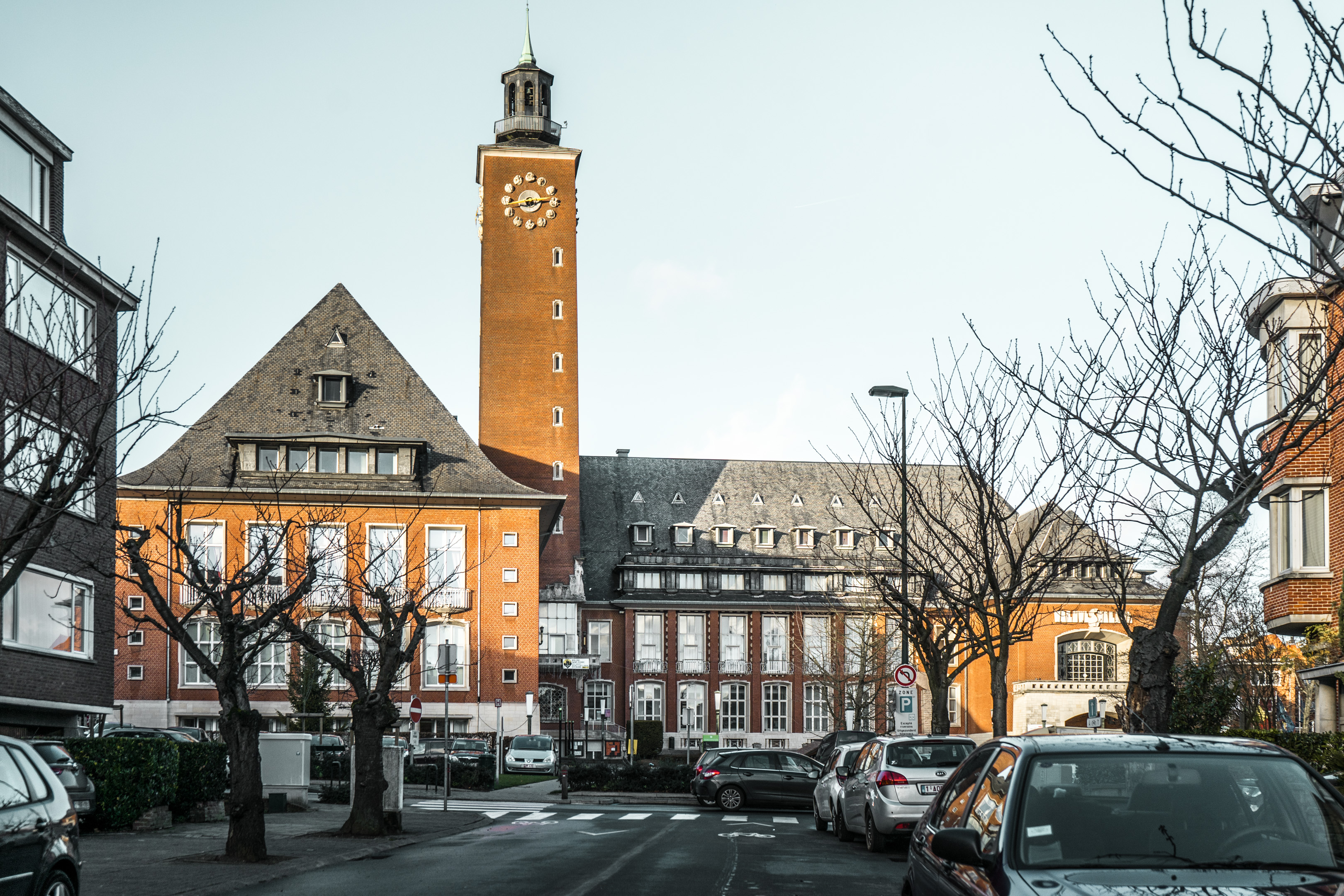 Hotel de Ville